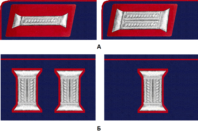 Милиция 47